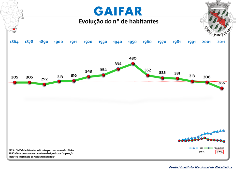 Cenos 1864/2011